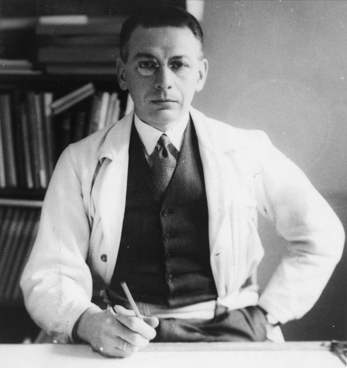 Peter Daniel Hofflund. Ukjent fotograf, ca. 1935. Fra Byhistorisk samling hos Oslo Museum.